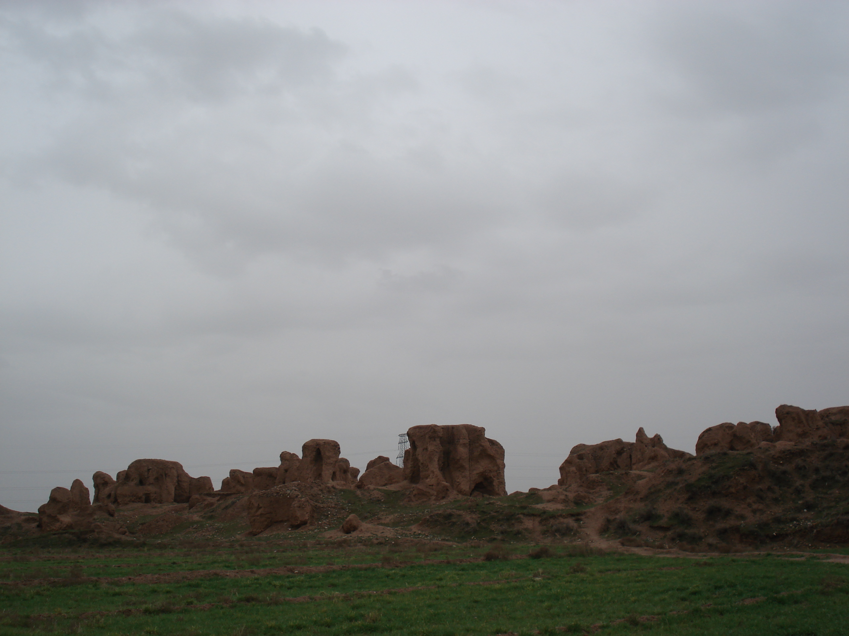 Kohandezh outside view in Neyshabur